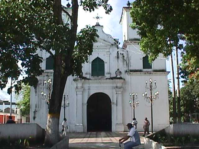 Cumanacoa, estado Sucre - Venezuela (1998)